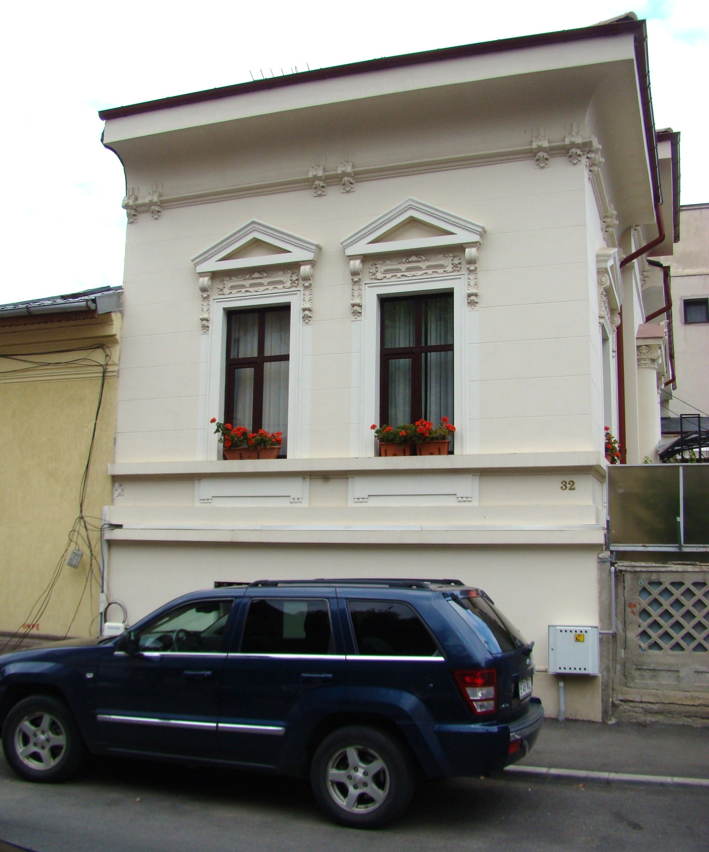 Clădire monument istoric, str. Louis Blank, nr.32